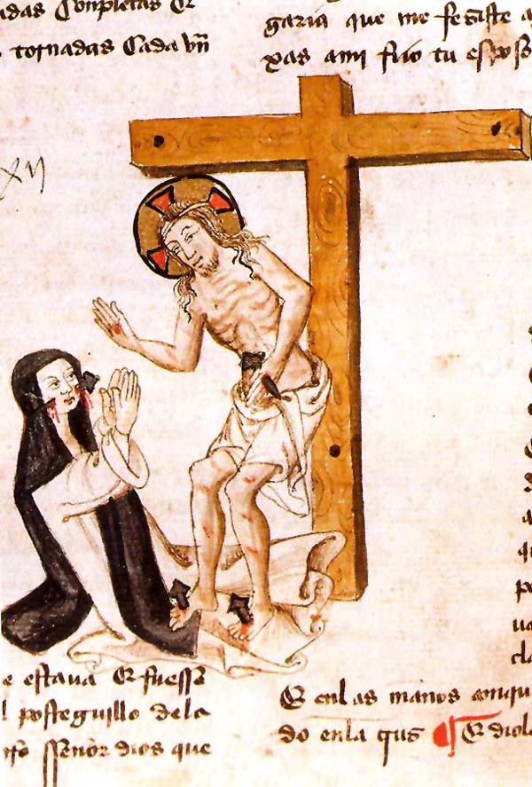 Manuscrito de Castigos y documentos del rey don Sancho